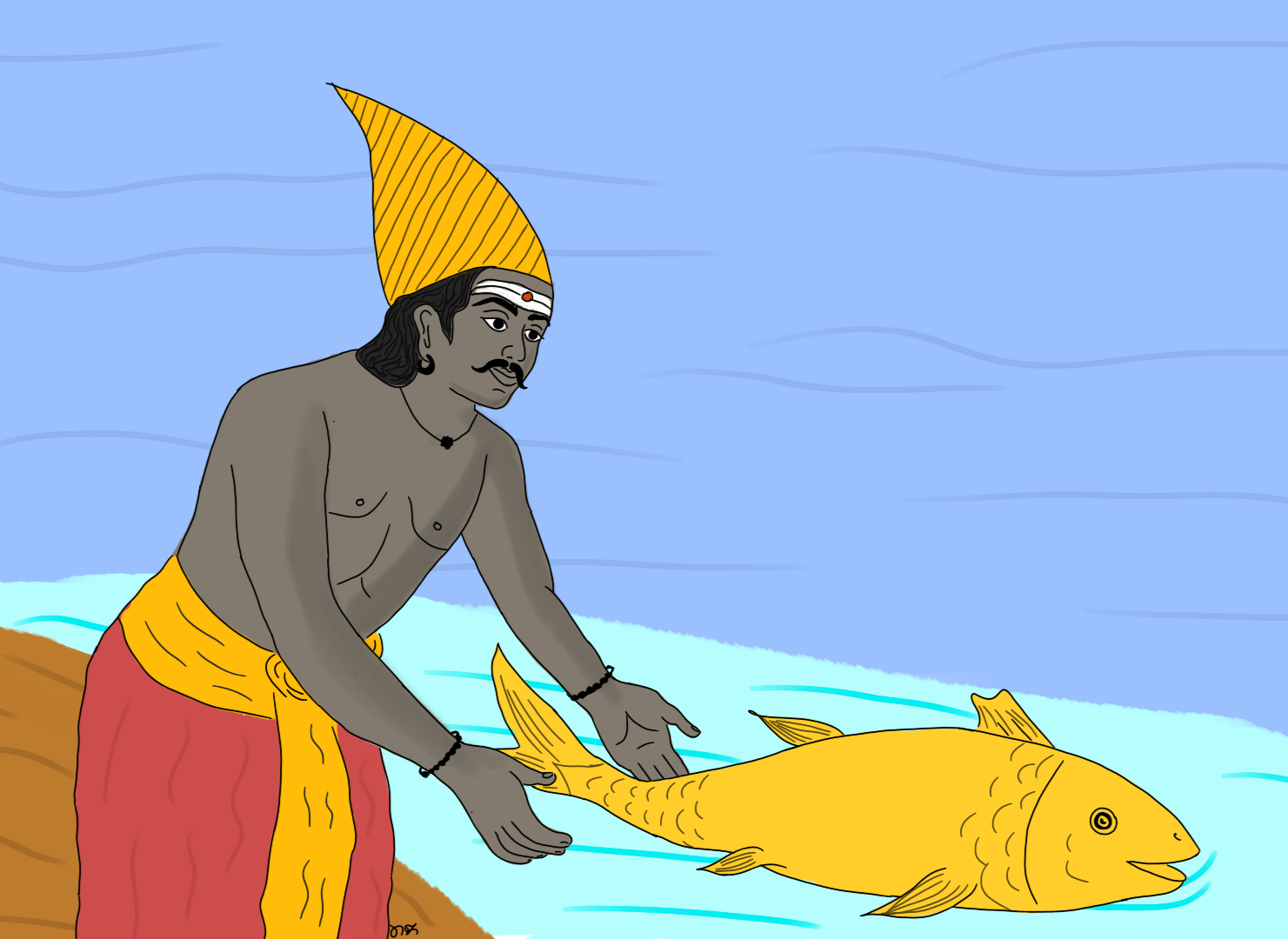 அதிபத்த நாயனார் சிவத்தொண்டர்களாக வாழ்ந்த அறுபத்து மூன்று நாயன்மார்களுள் ஒருவராவார். இவர் மீன்பிடிப்பதை தொழிலாக கொண்டிருந்தவர்.